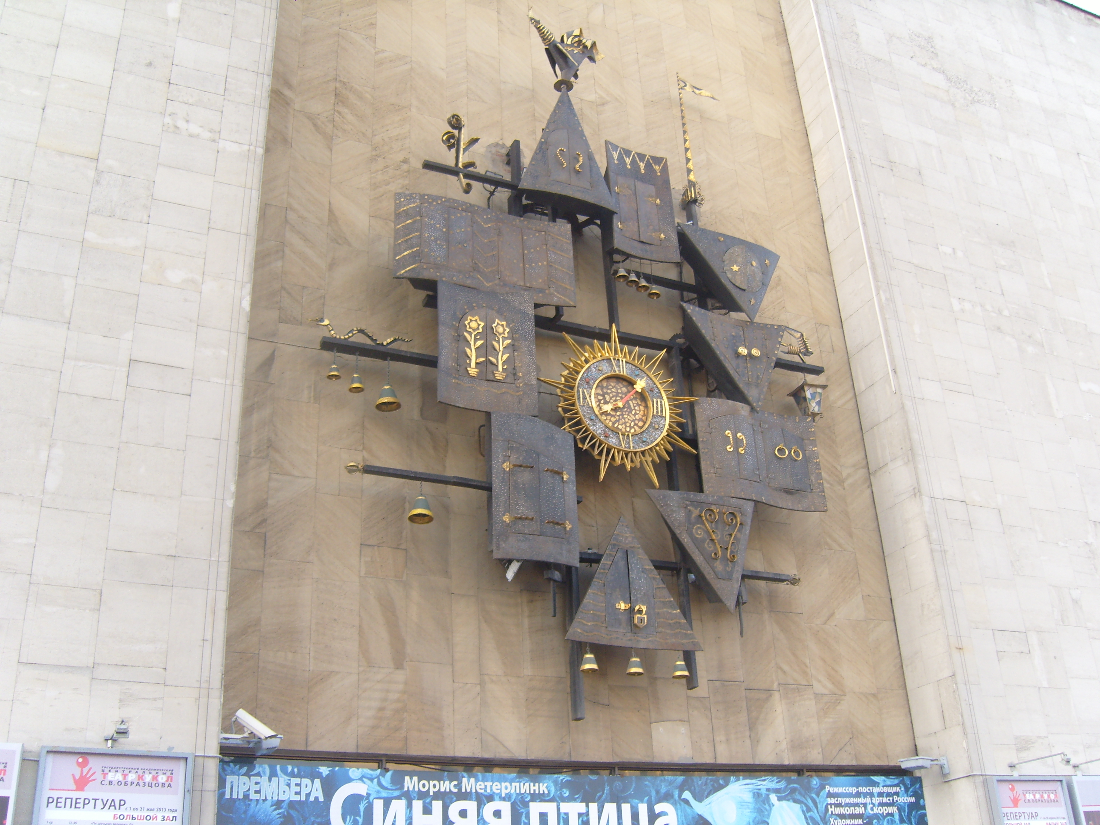 Декоративные часы из металла с движущимися элементами на фасаде Центрального государственного театра кукол: Тверской, Центральный округ, Москва